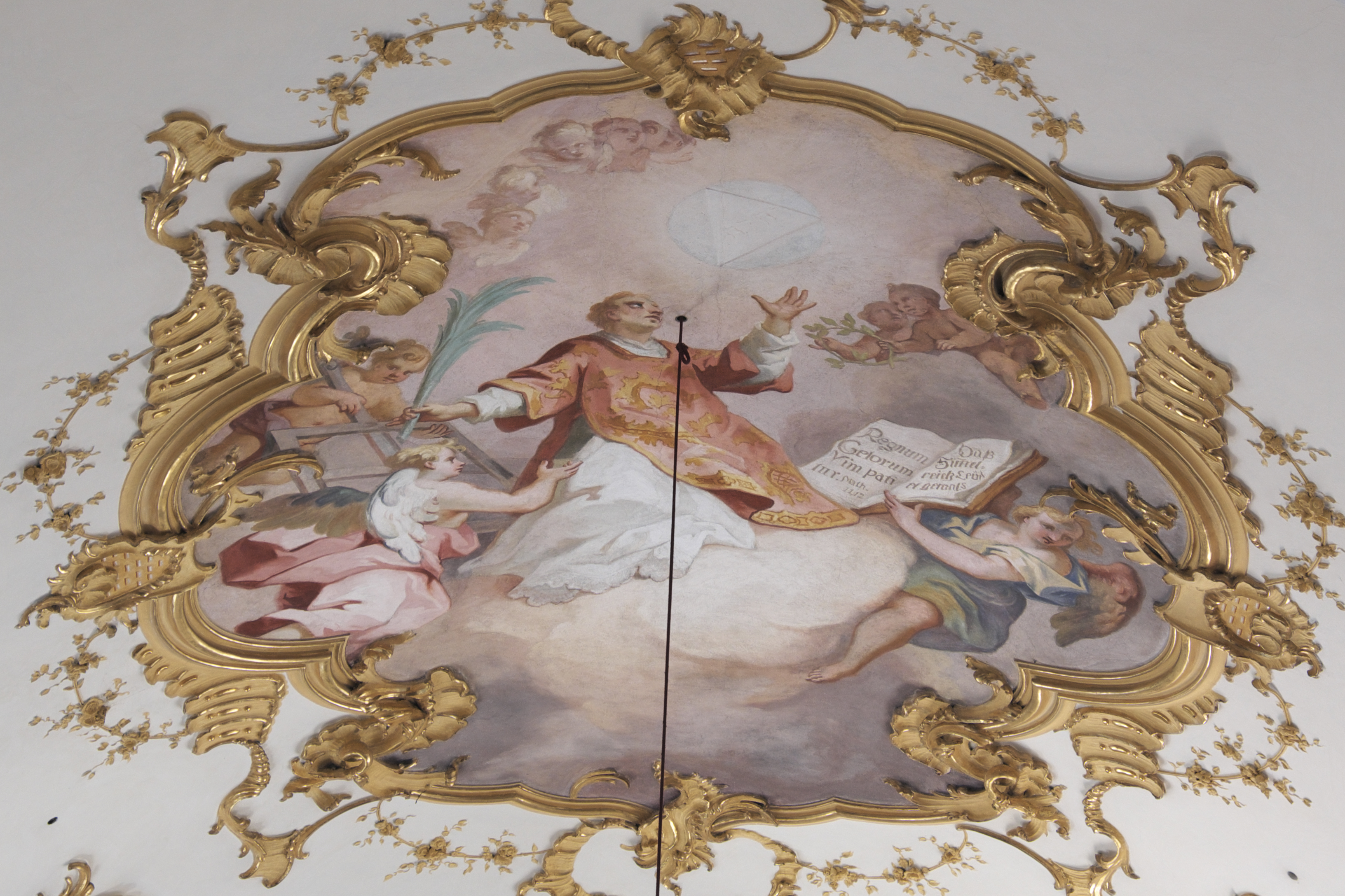 Katholische Filialkirche St. Laurentius in Pflugdorf (Vilgertshofen) im oberbayerischen Landkreis Landsberg am Lech (Bayern/Deutschland), Deckenfresken um 1757, Johann Baptist Zimmermann und seiner Werkstatt zugeschrieben; Darstellung: Szenen der Legende des heiligen Laurentius